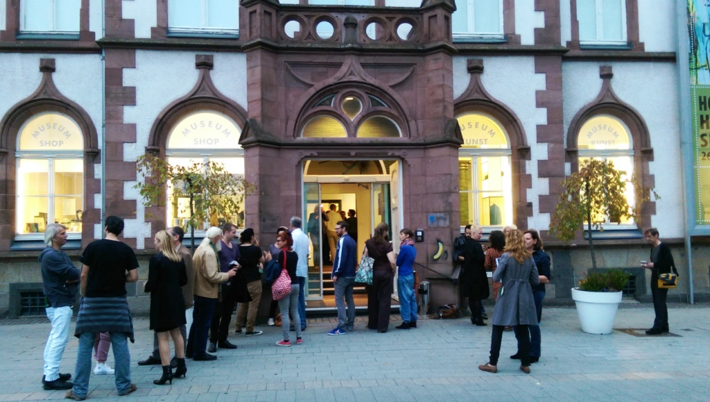 Kunstmuseum Kunststadt Mülheim an der Ruhr